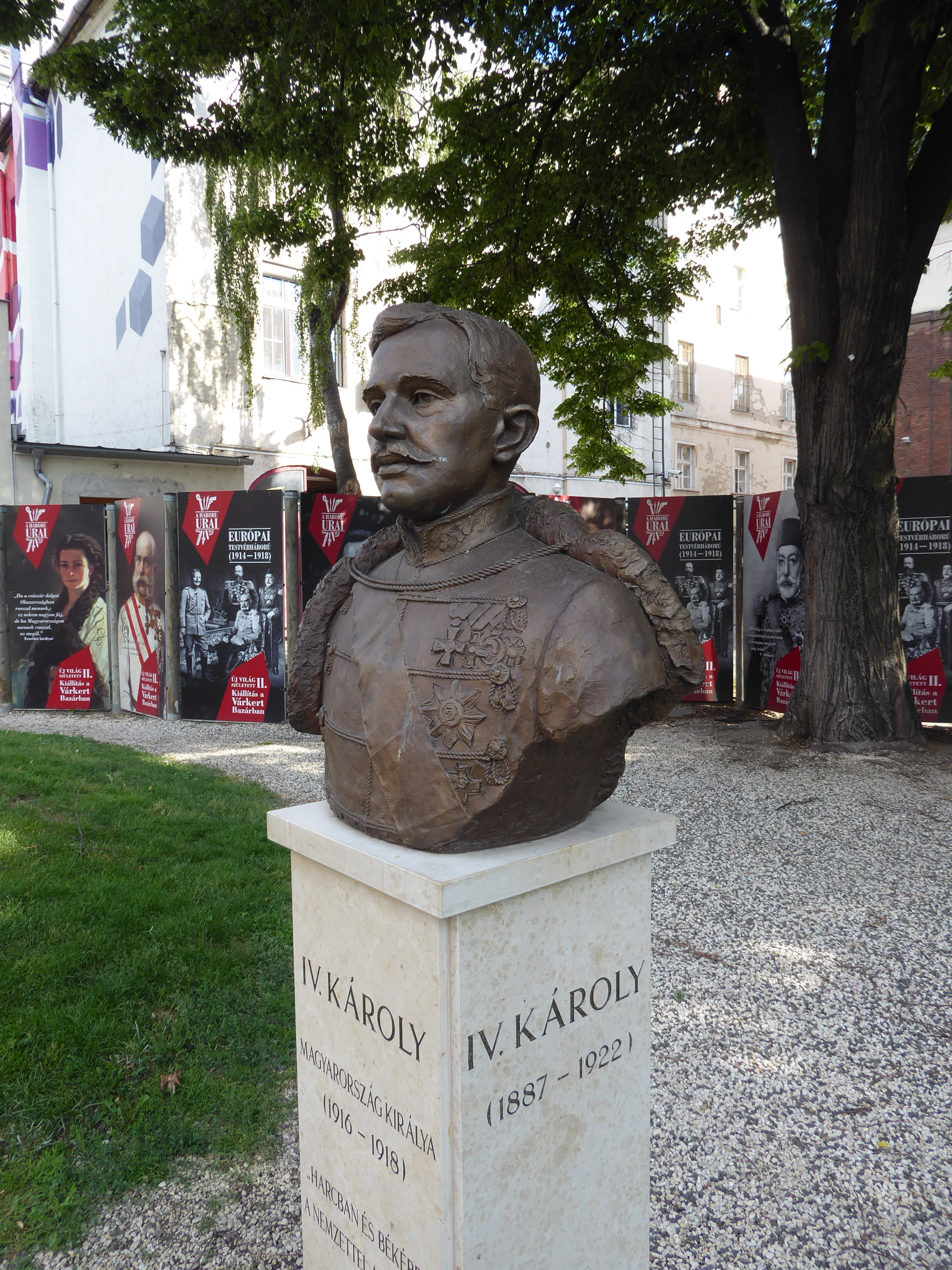 IV. Károly magyar király bronz mellszobra, Budapest V., Károly körút nyugati oldala, a Főpolgármesteri hivatal mögött. Szobrász: Juha Richárd. A fényképet 2018-05-20-n készítettem.